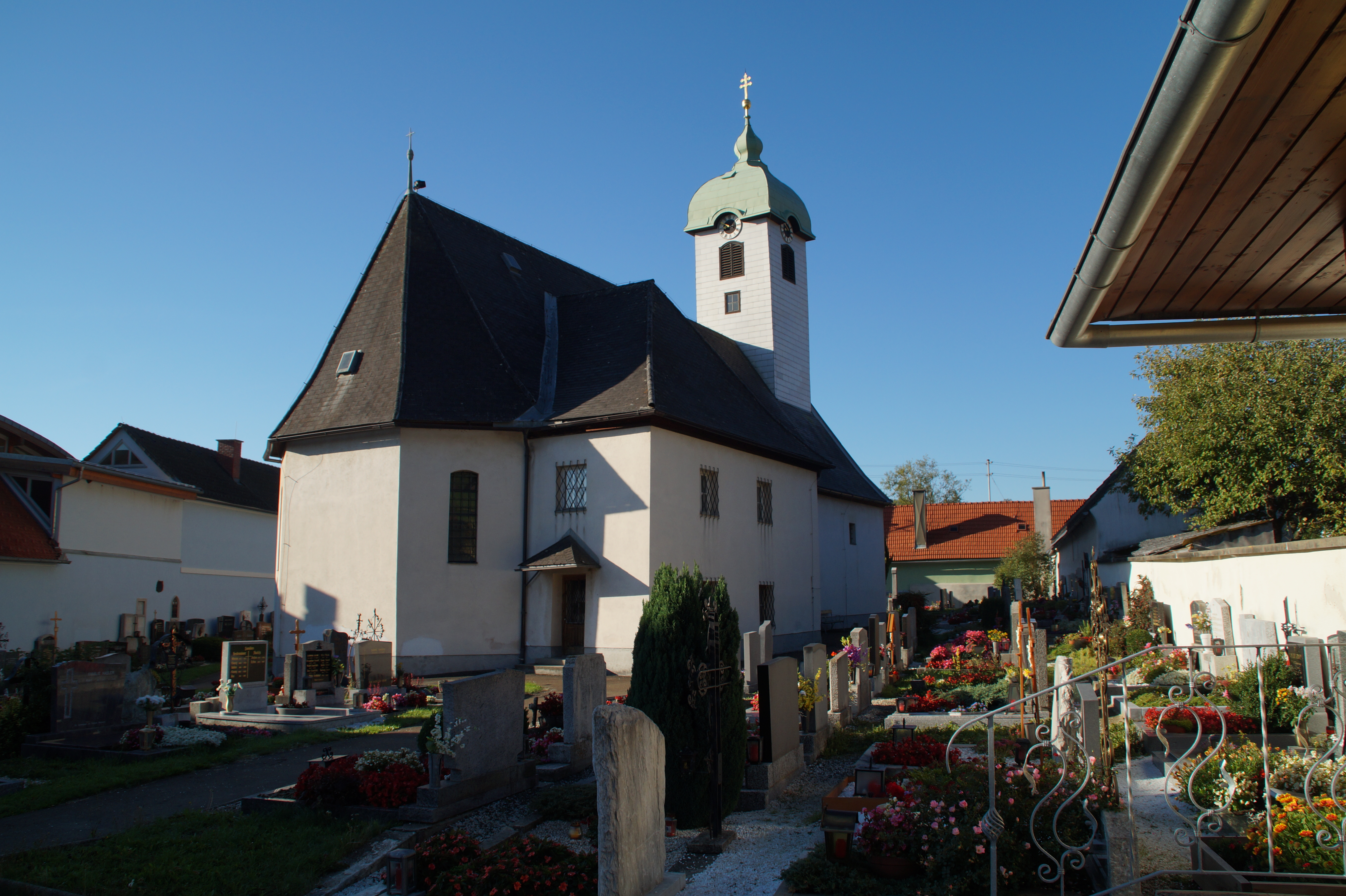 Kath. Pfarrkirche hl. Georg und Friedhofsmauer, Kraubath, Bezirk Leoben